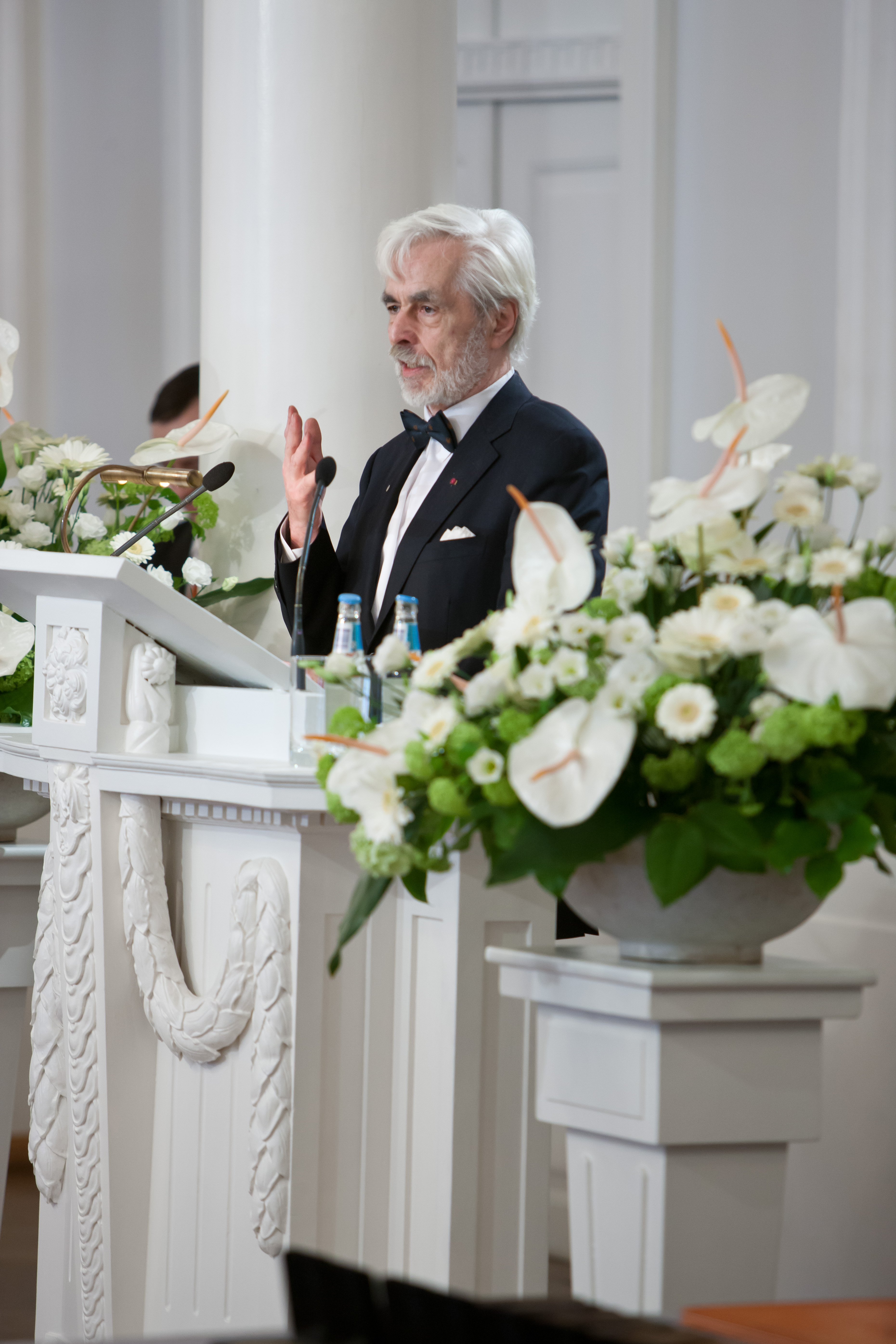 Eesti Vabariigi teaduspreemiate, F. J. Wiedemanni keeleauhinna, spordi- ja kultuuripreemiate kätteandmine 24. veebruaril 2012. aastal Tartu Ülikooli aulas. Teaduspreemiate komisjoni esimees, Teaduste Akadeemia president akadeemik Richard Villems esineb tervituskõnega.